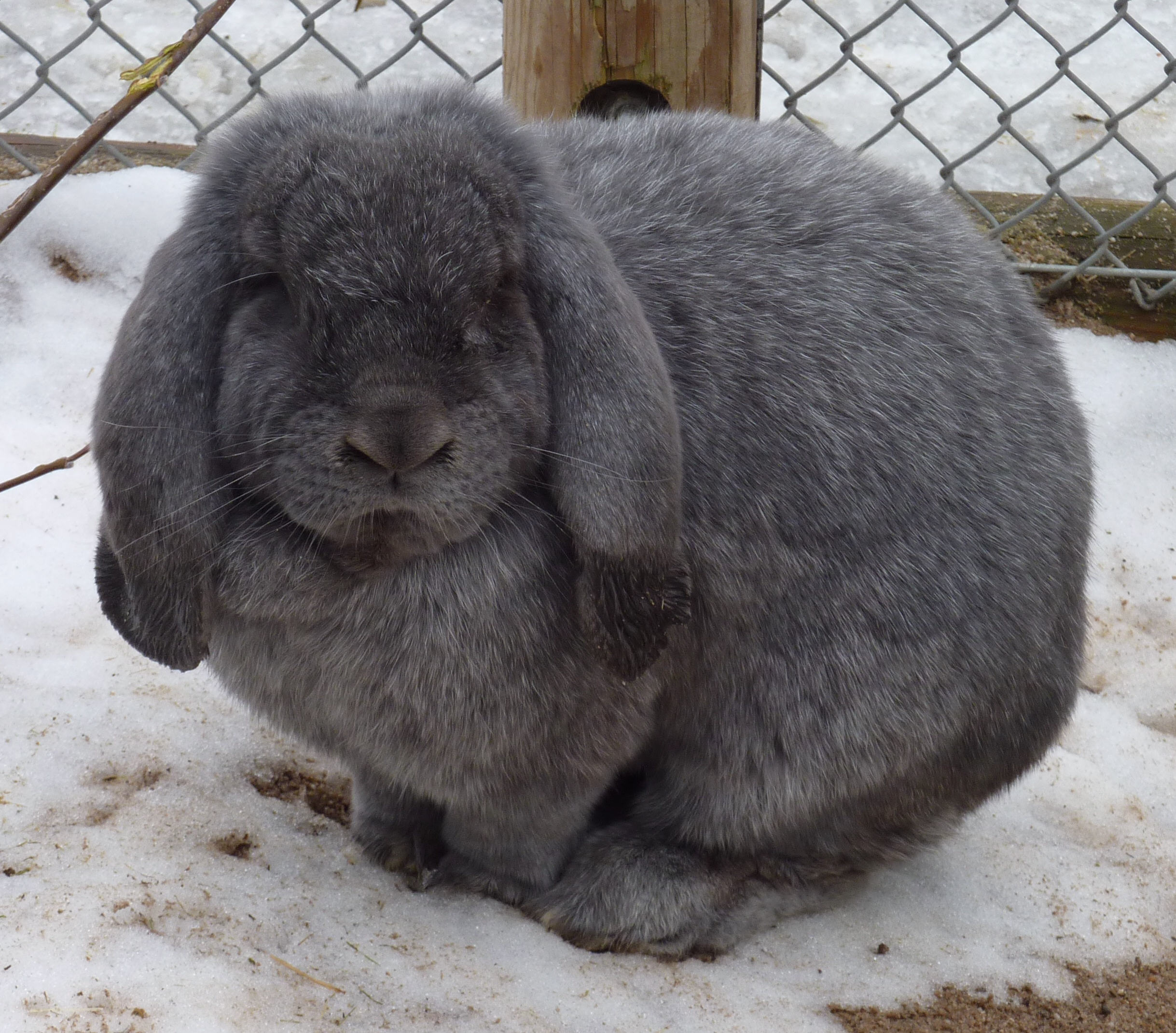 Widderkaninchen im Schaubauernhof der Wilhelma